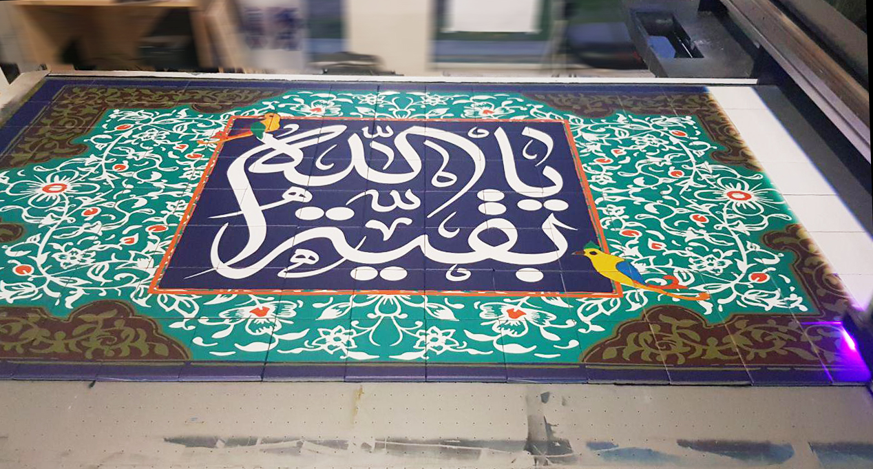 دستگاه فلت بد در حال چاپ روی تکه های کوچک کاشی